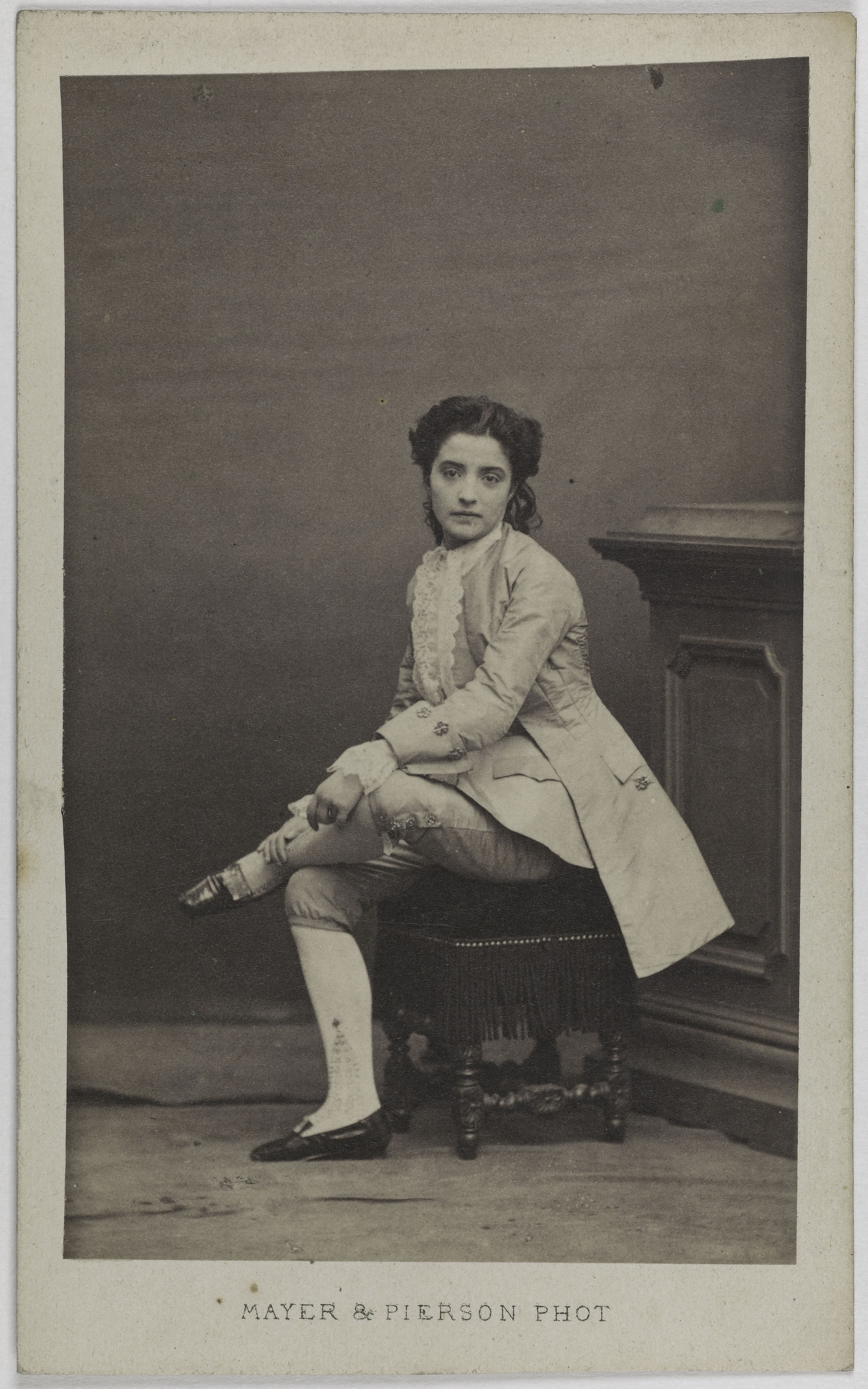 Portrait de Julia Zoé Pfotzer, actrice, dans le costume de Valentin en "La Chanson de Fortunio" de J. Offenbach. Carte de visite (recto). Photographie de Mayer Frères et Pierson. Tirage sur papier albuminé, 1860-1890. Paris, musée Carnavalet.